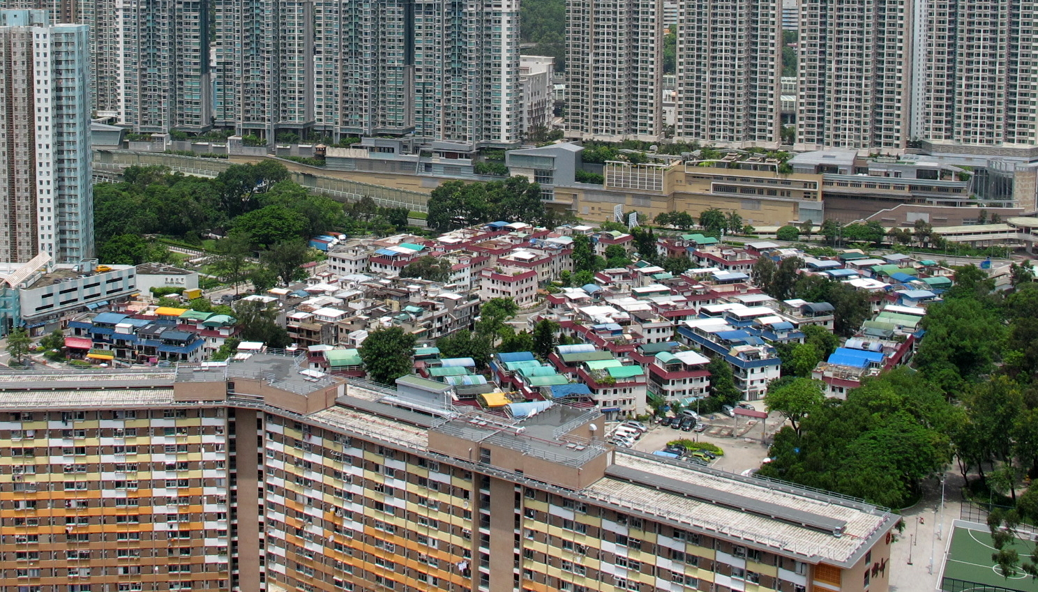 Tin Sum Tsuen